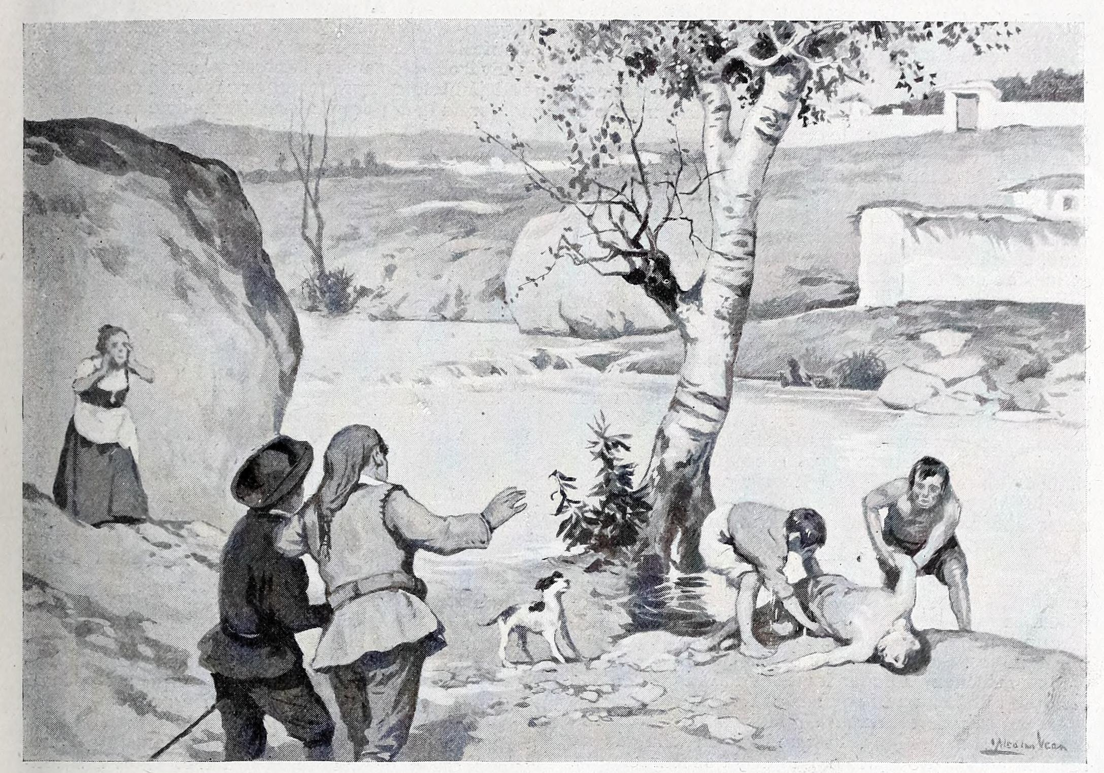 Personajes estrafalarios. El poeta Poinsinet.